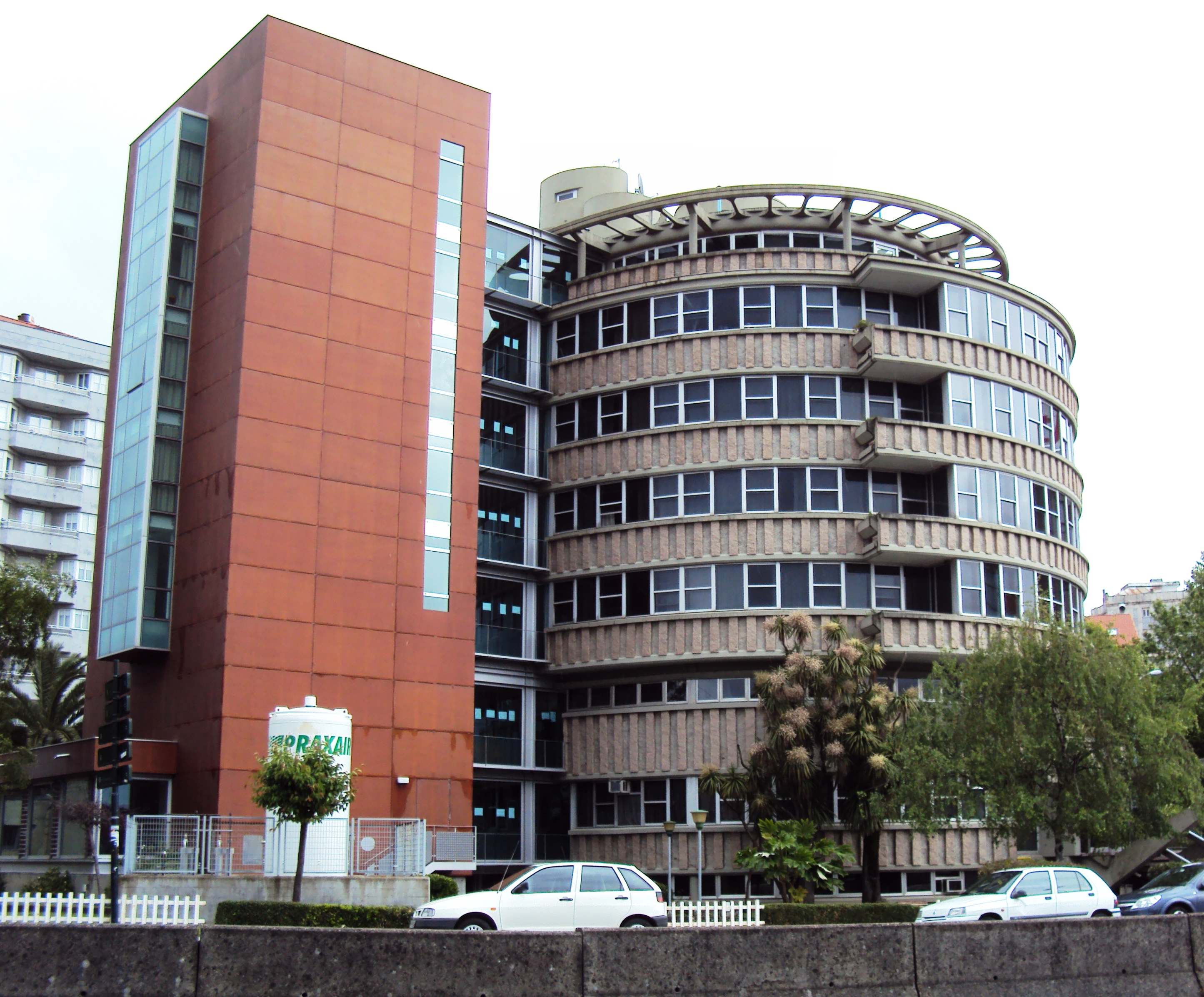 'Unidade de cirurxía de ciclo rápido Cíes' (Policlínico Cíes), do arquitecto Xosé Bar Boo, Vigo.